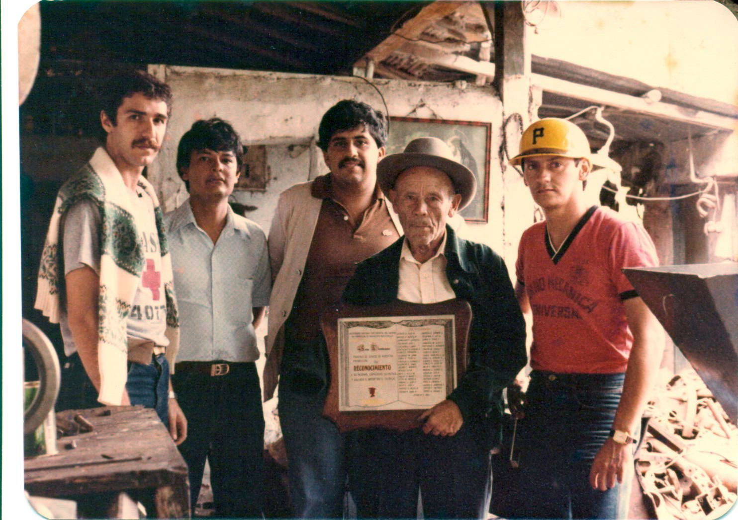 Estudiantes de la Unet visitando a Don Luis Zambrano en su casa Taller de Bailadores (Mérida) le entregan la placa de Reconocimiento y luego lo llevan a San Cristóbal. Ellos son: (izq a der) Jaime Galiñanes, Alfonso Ochoa, Jairo Solano y Pedro Gómez.